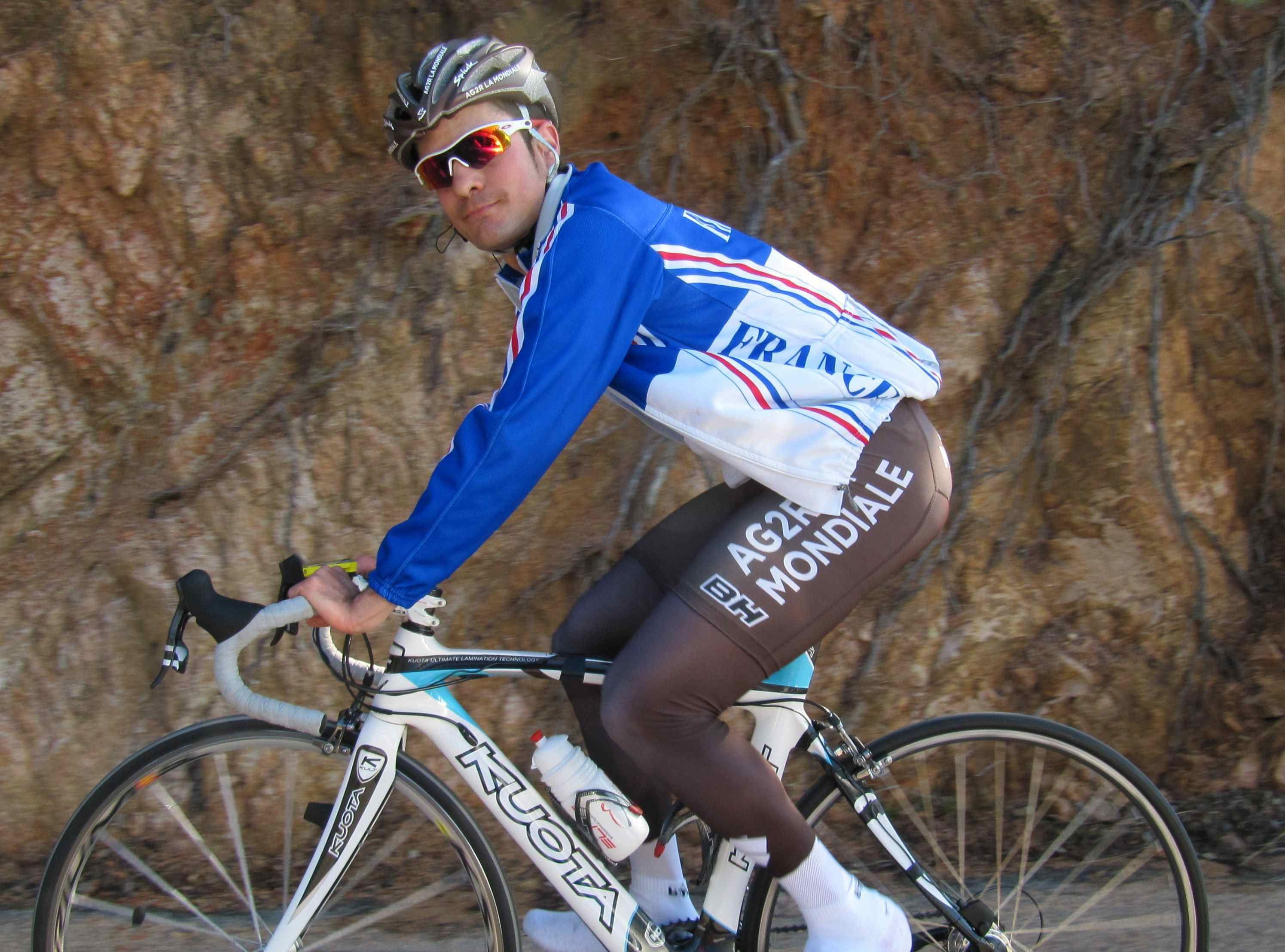 Entrainement de Thomas Damuseau avant course en équipe de France.